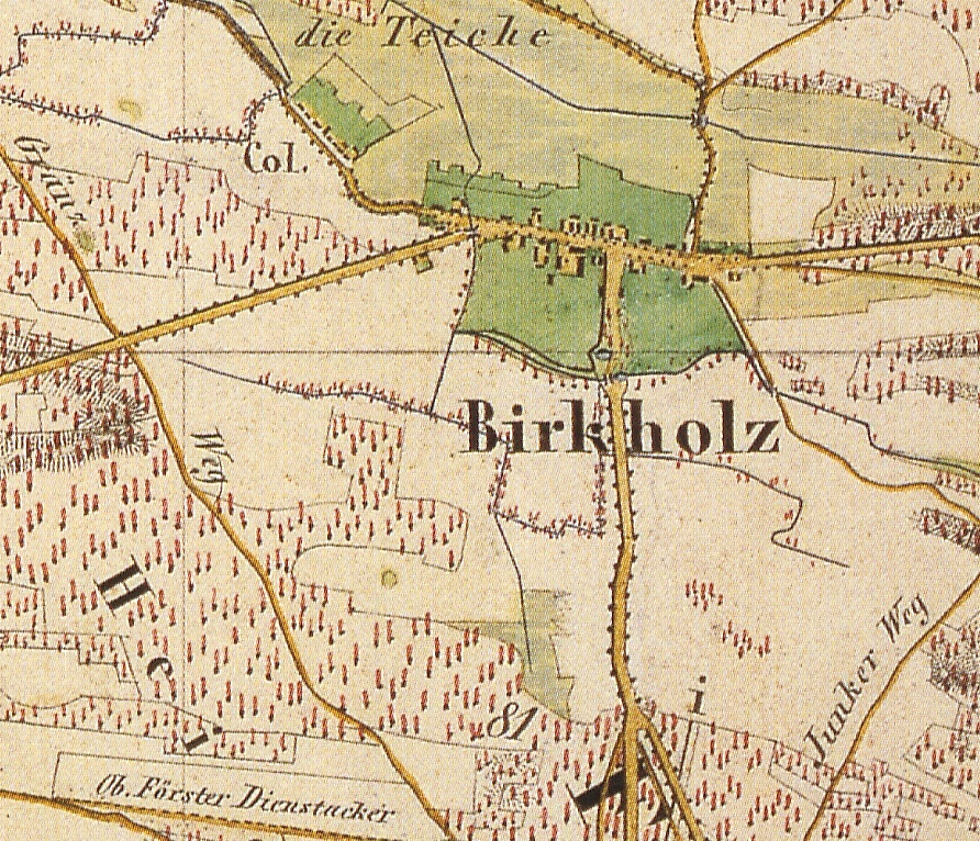 Birkholz, Gemeindeteil von Münchehofe, Landkreis Dahme-Spreewald, Brandenburg, Ausschnitt aus dem Urmesstischblatt 3848 Märkisch Buchholz von 1841